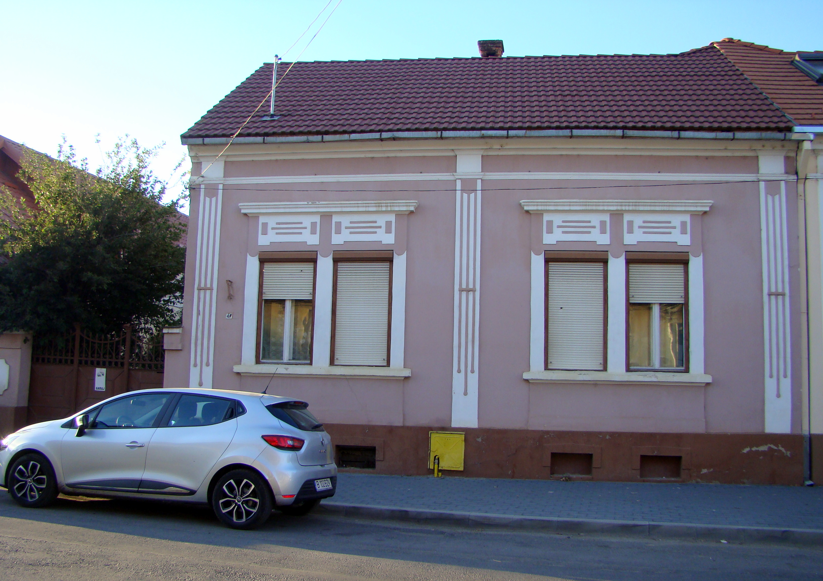 Casă, municipiul Făgăraș, str. Bălcescu Nicolae 47 1920